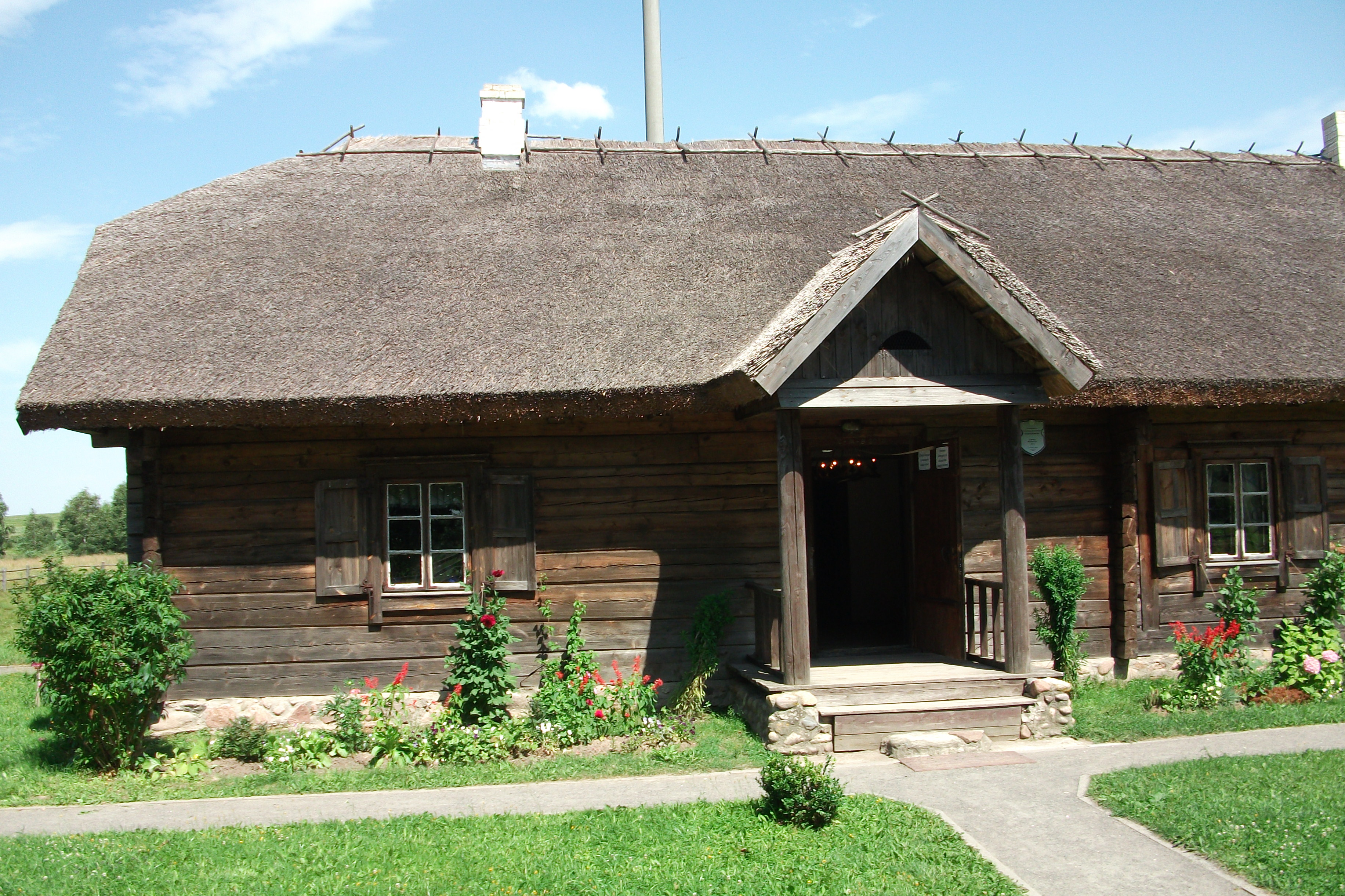 Сядзіба-мэмарыял Адама Міцкевіча. Хутар Завоссе. This is a photo of Belarusian heritage monument. Reference number: 113Г000056 ( WLM)